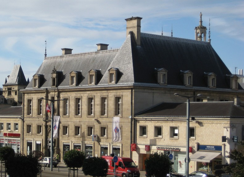 Vue d'ensemble de l'hôtel d'Escoville à Caen